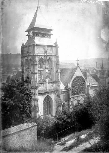 Eglise Saint-Ouen de Longpaon, clocher, photographie en négatif par Enlart, Camille (historien).